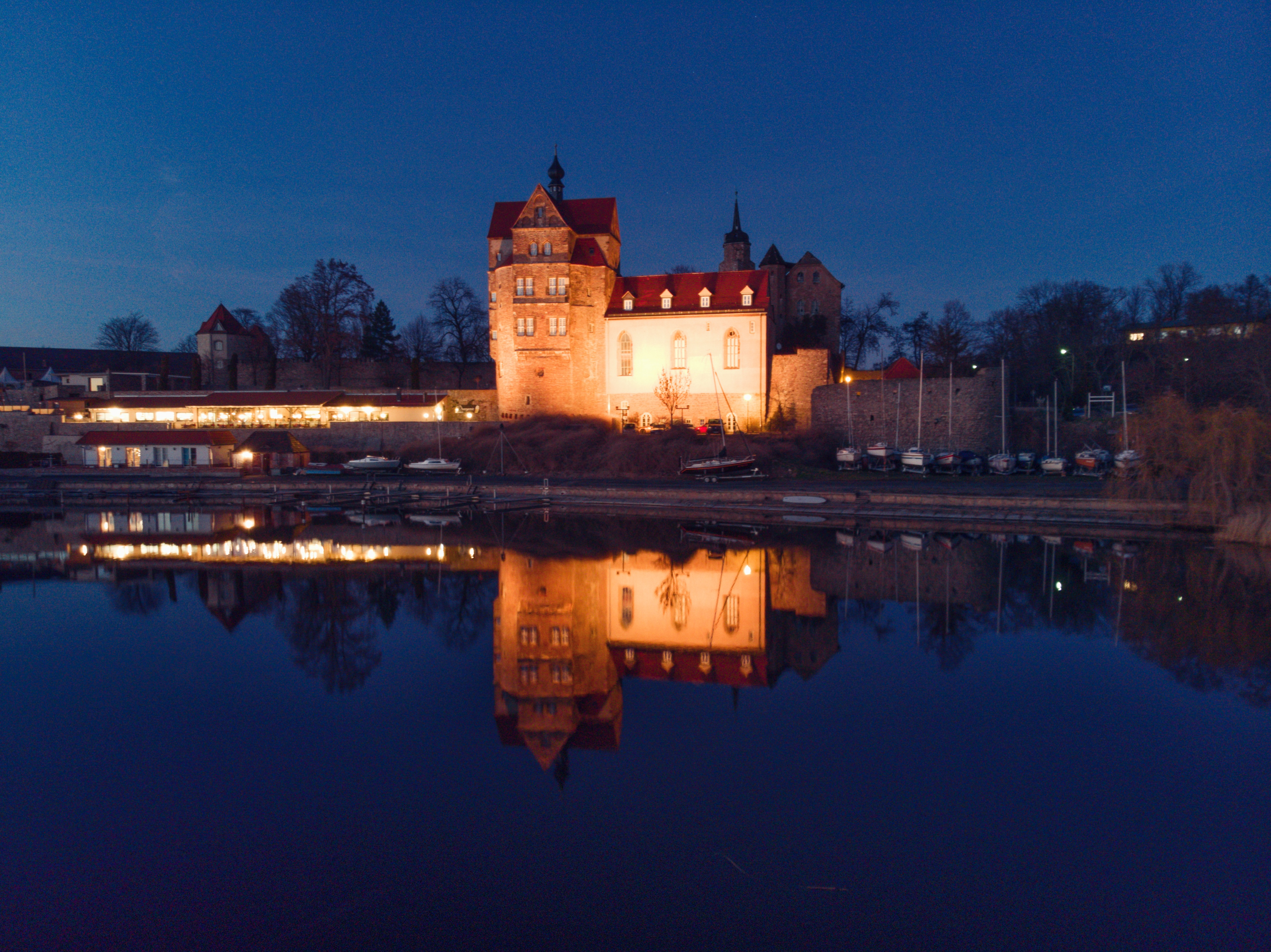 Luftaufnahme Schloss Seeburg bei Nacht